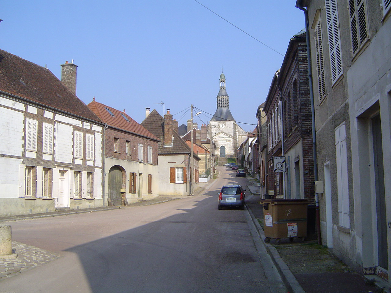 Saint-Mards-en-Othe - L'église